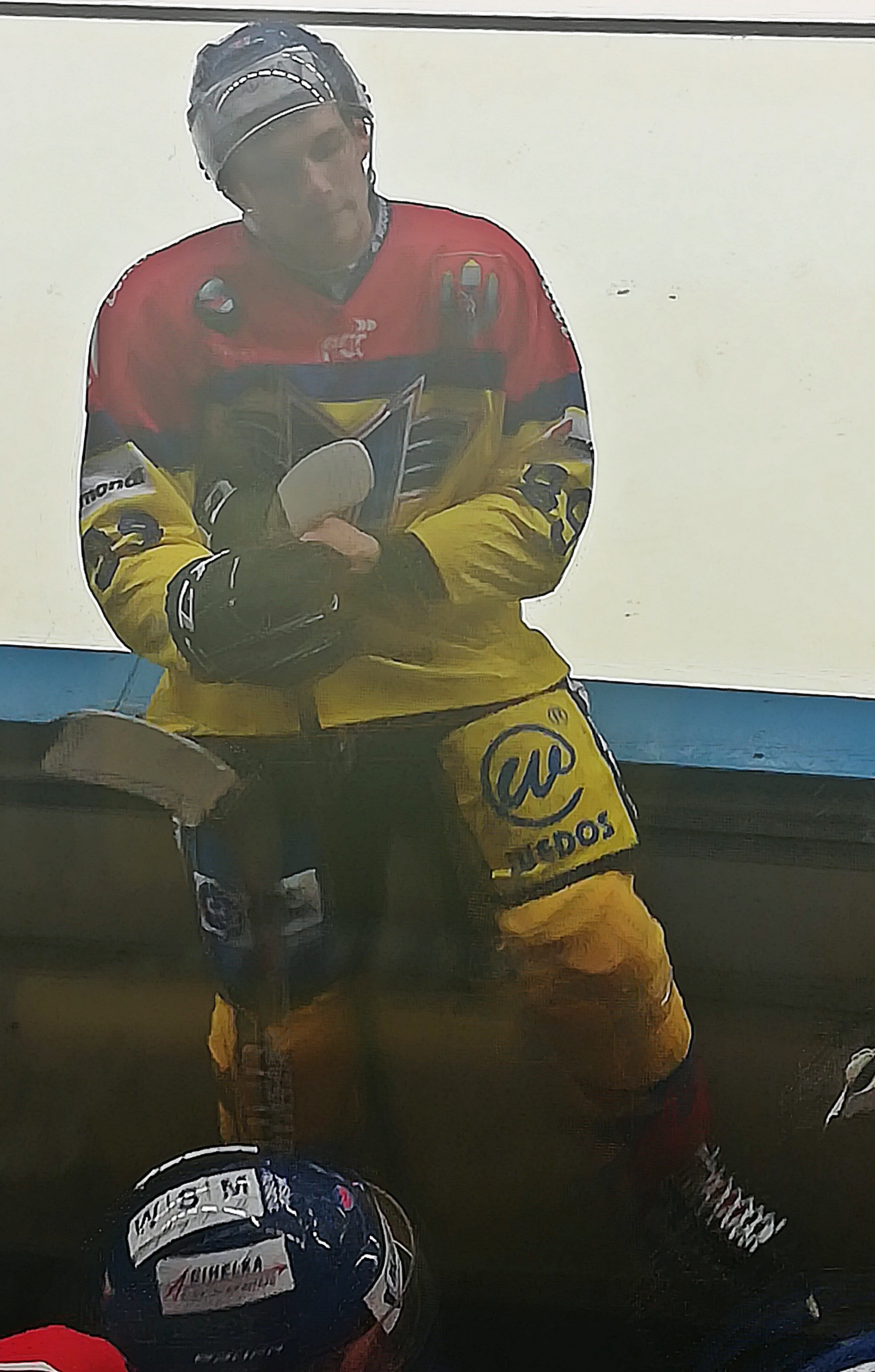 HC Zubr Přerov - ČEZ Motor České Budějovice